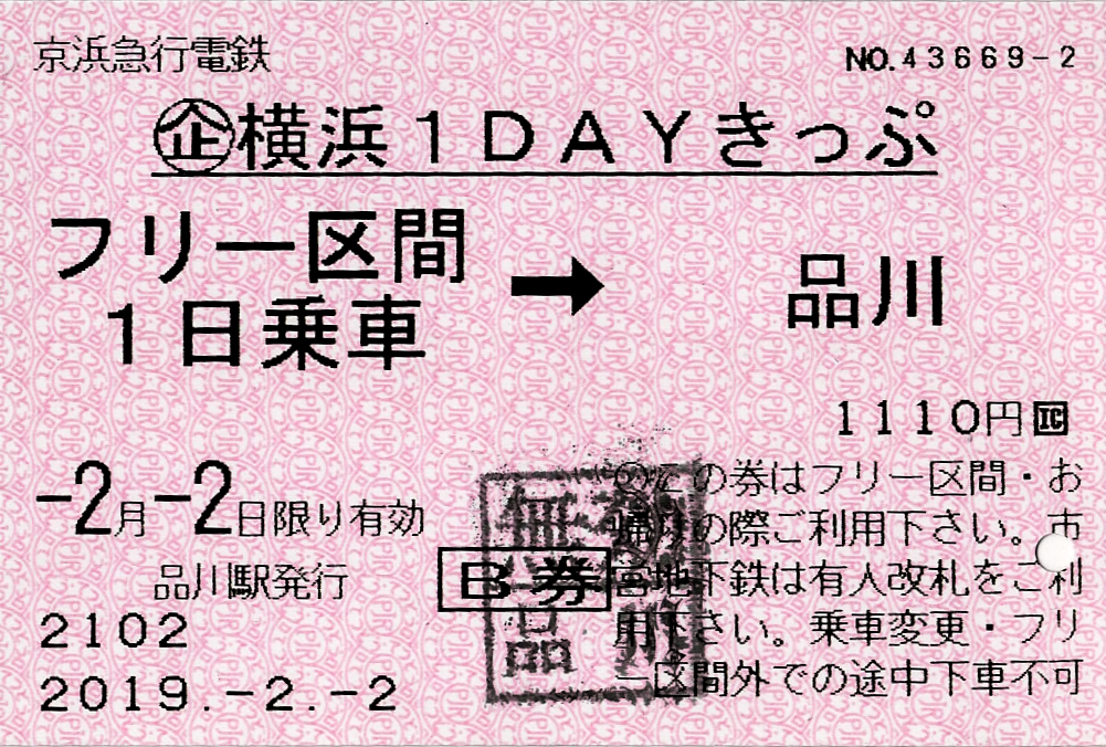 京浜急行電鉄 横浜1DAYきっぷ B券 品川発着